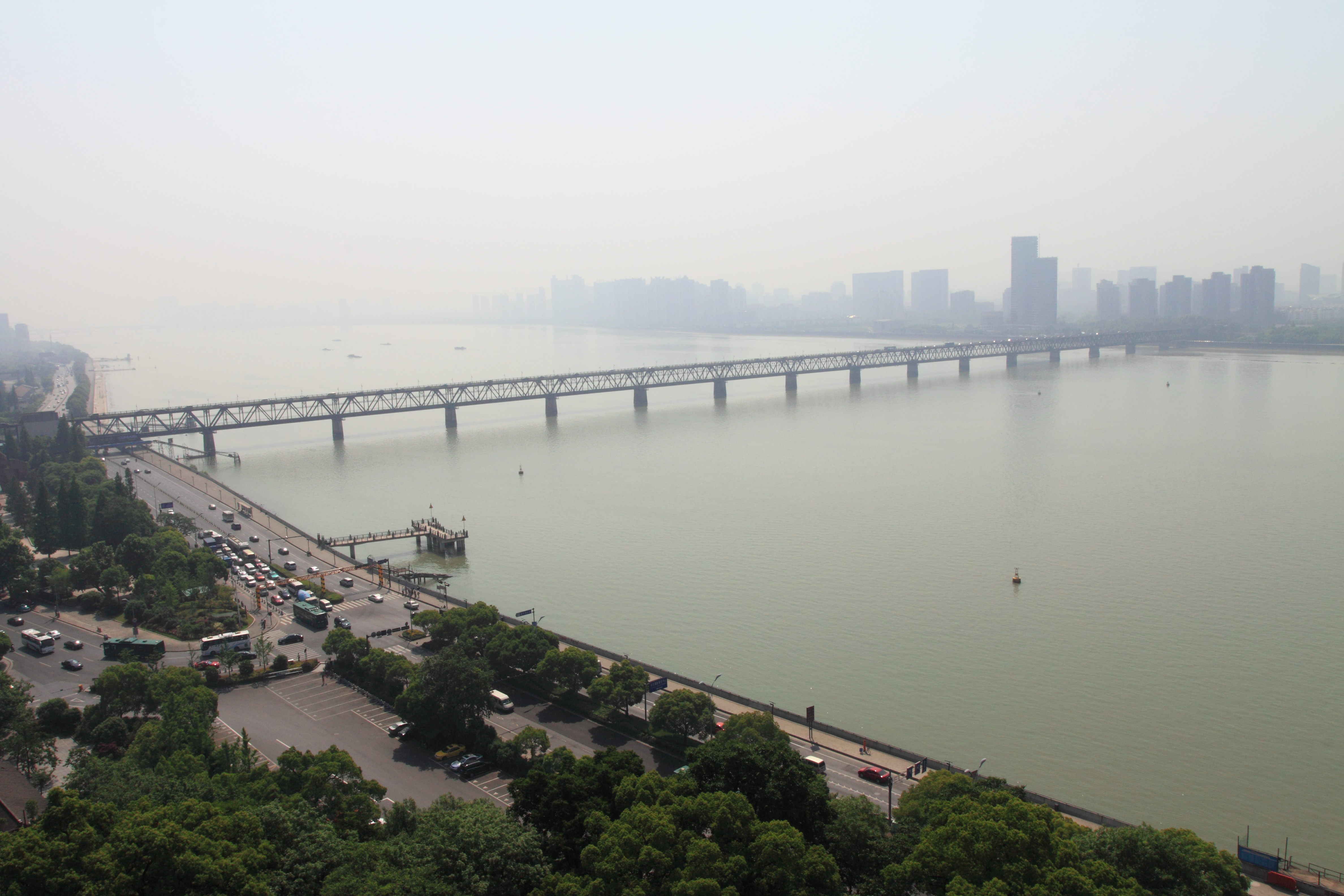 六和塔顶层俯瞰钱塘江大桥。